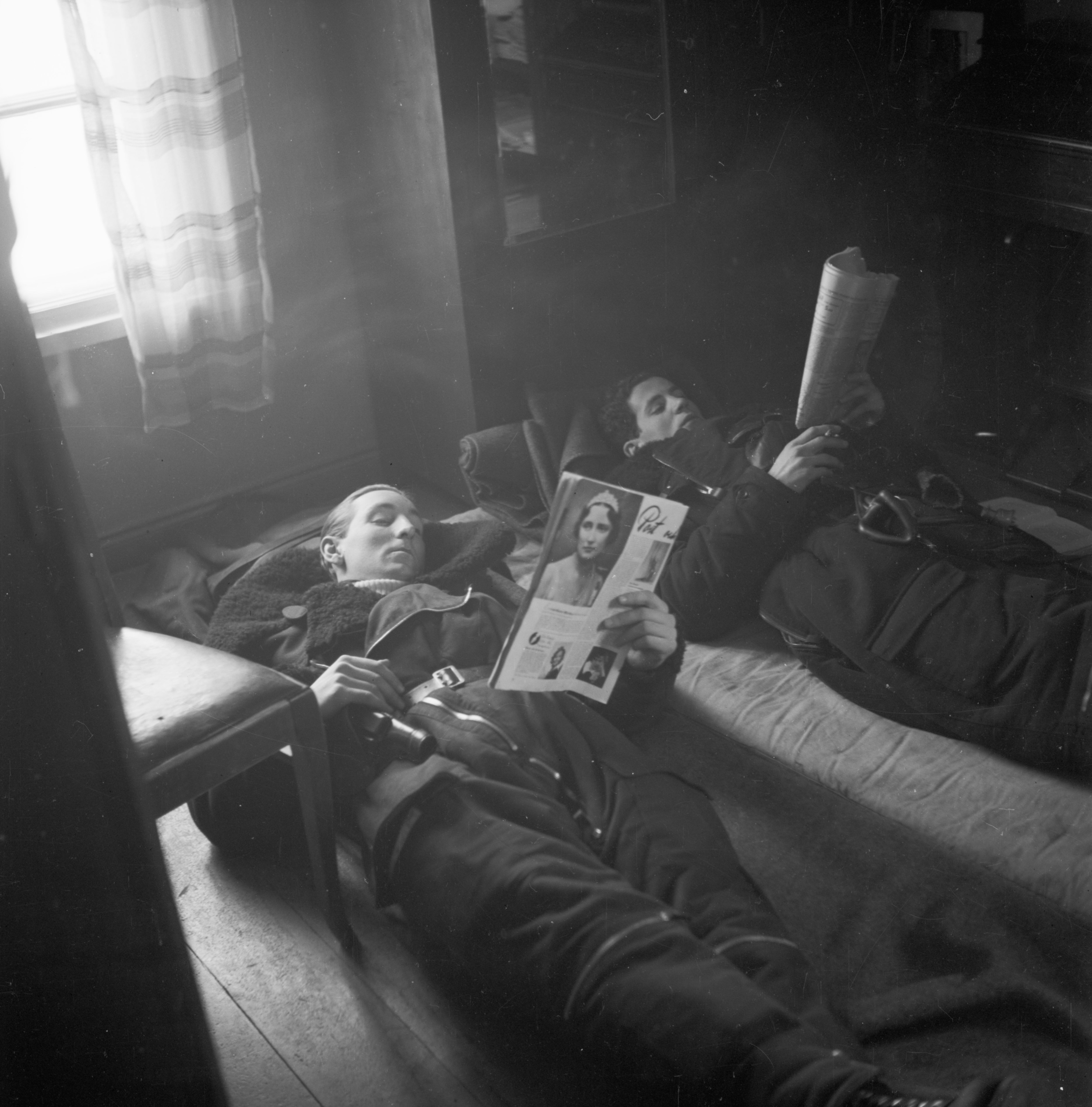 Flygförare Ian Iacobi och Roland Martin vilar på sängar i väntan på uppdrag vid Oskarsbasen vid F 19, Svenska frivilligkåren i Finland. Ur F 19-samlingen. Tillhör Flygvapenmuseums bildarkiv. Ligger i public domain.